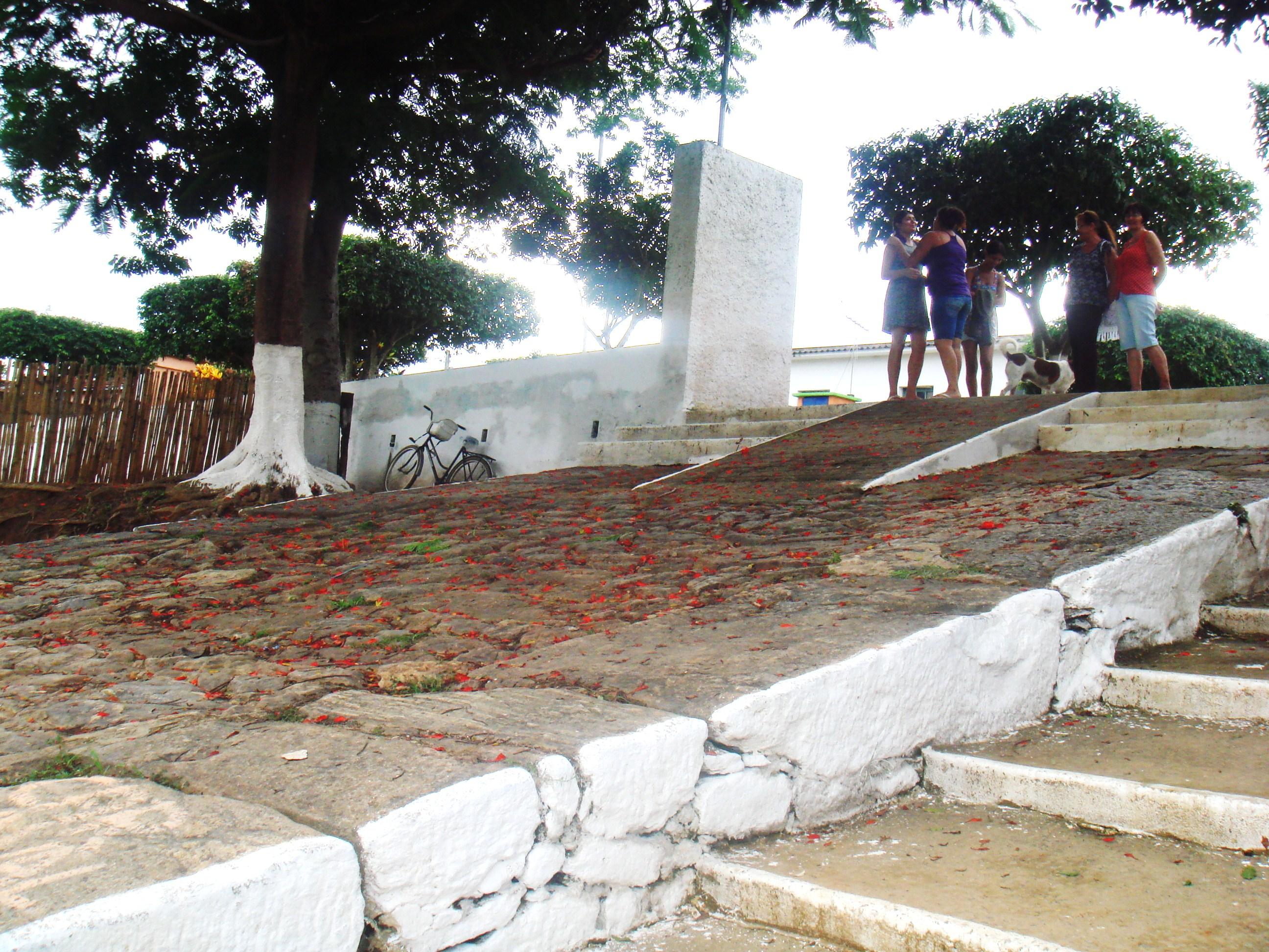 Porto de Três Irmãos